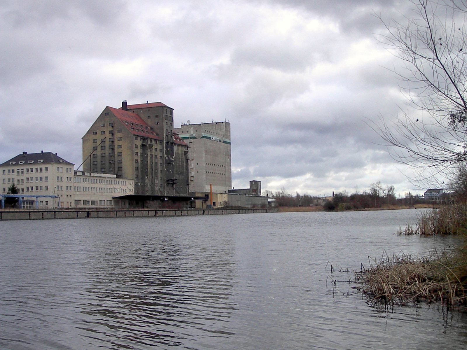 Hafen Leipzig-Lindenau